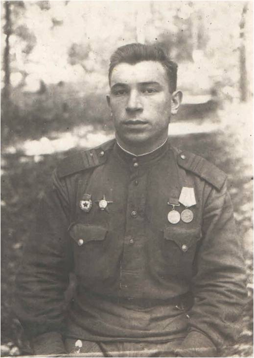 Воробьев А.Д. 1944